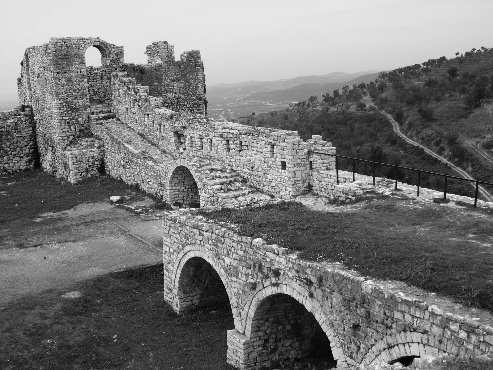 Berat Fortress, Albania.